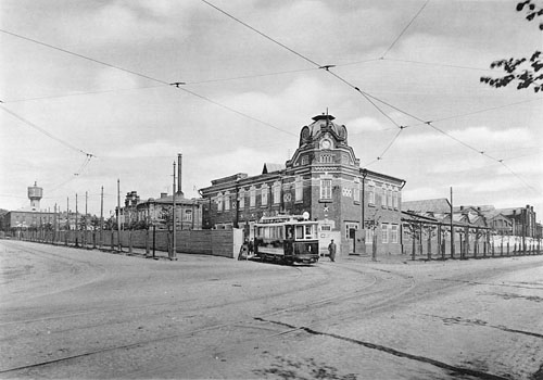 168. Главныя Сокольническiя мастерскiя город. желЪзн. дорогъ. (уг. Матросской Тишины и 5-й Сокольнич. ул.) (Москва - СВАРЗ)